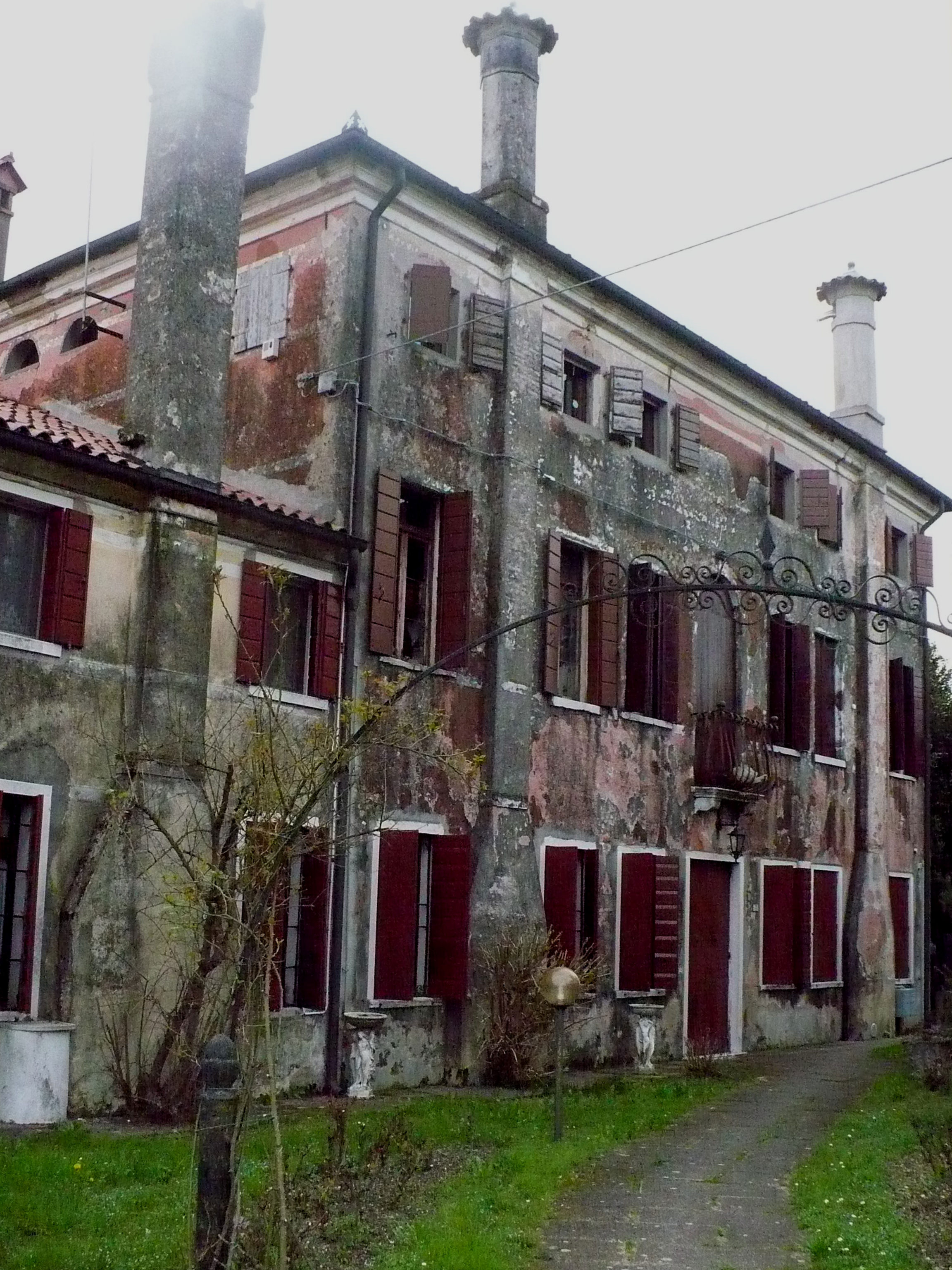 Gardigiano, frazione di Scorzè: facciata settentrionale di Villa Frattin.